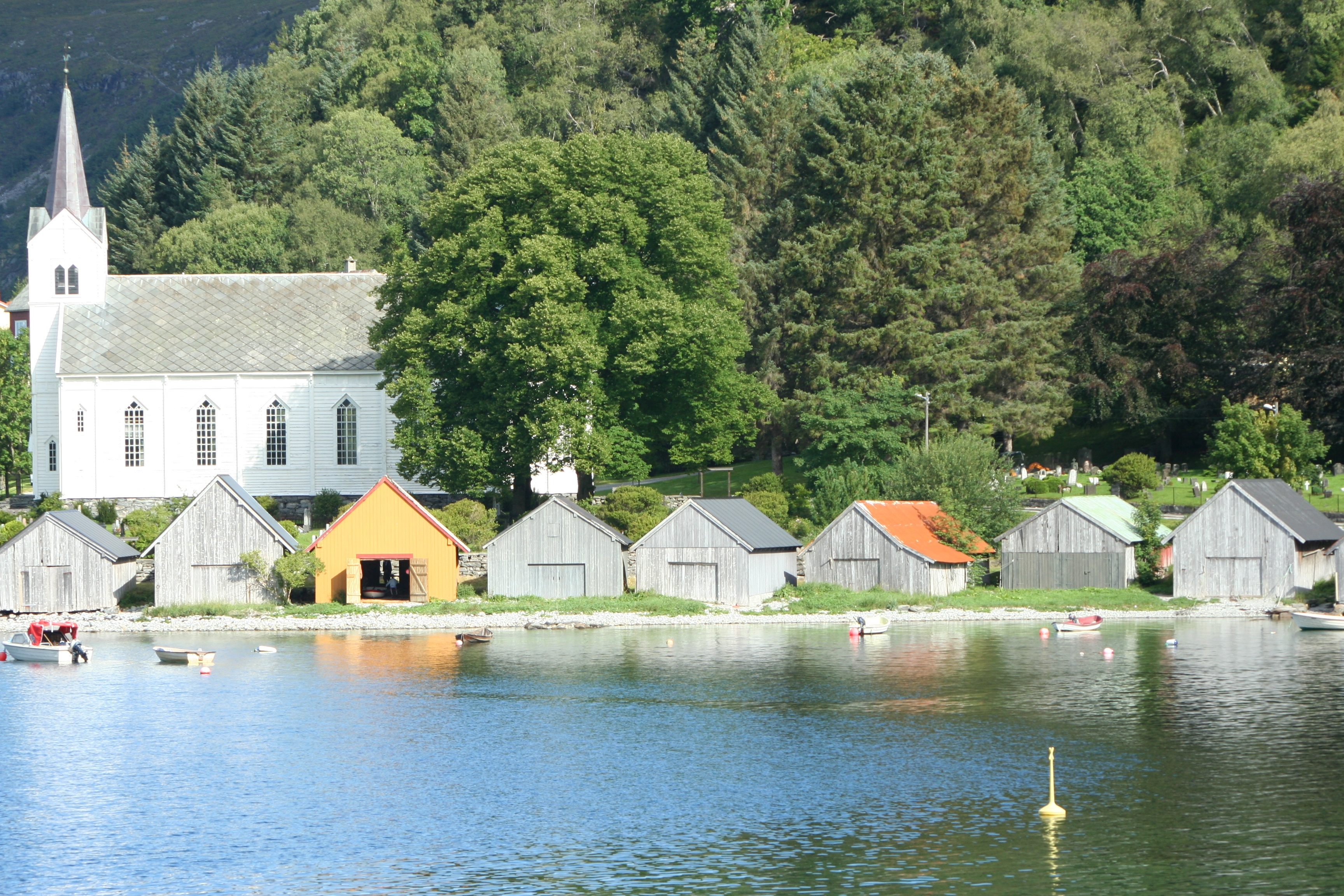 Selja kyrkje